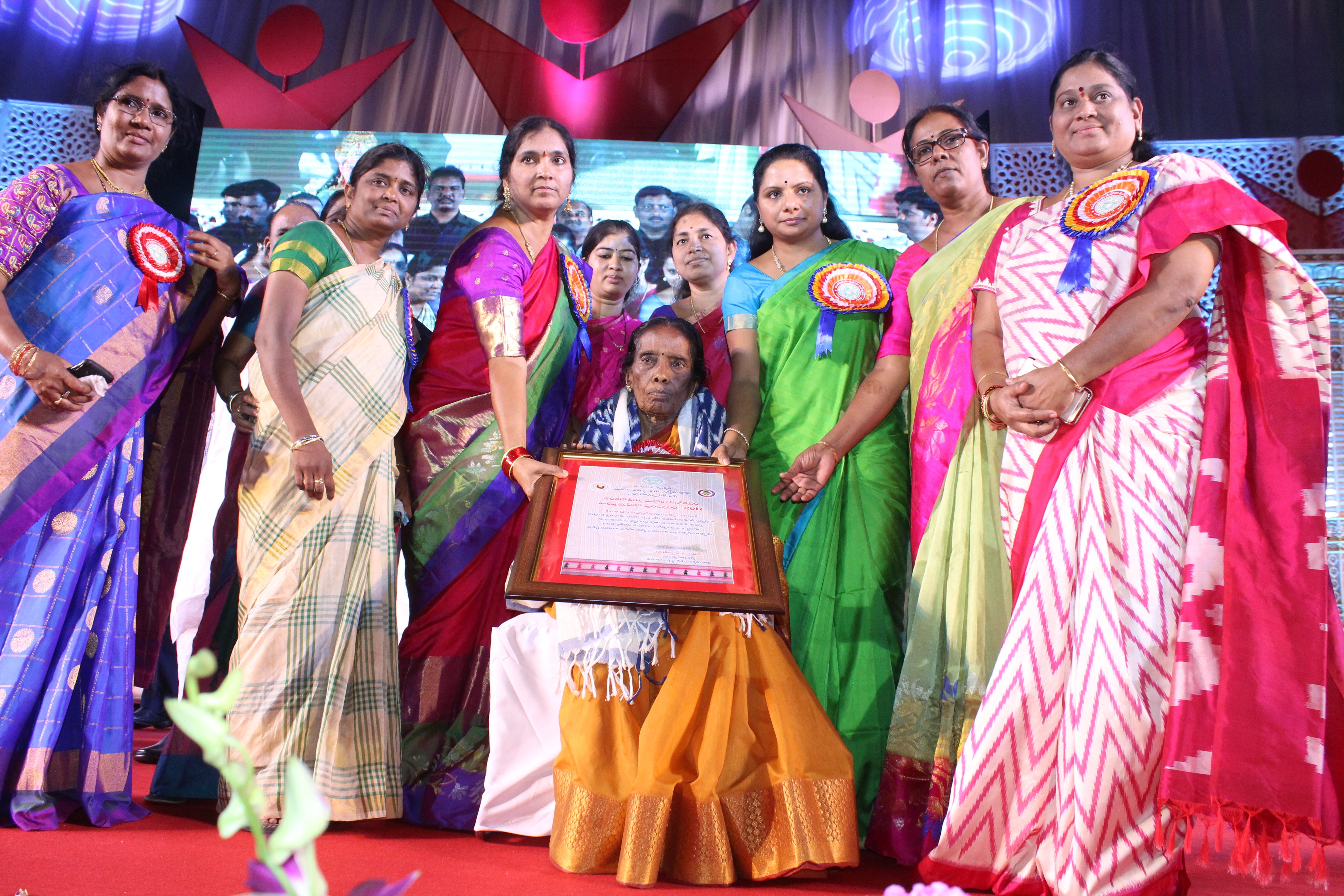 తెలంగాణ రాష్ట్ర విశిష్ట మహిళా పురస్కారం అందుకుంటున్న ప్రొ. విద్యావతి